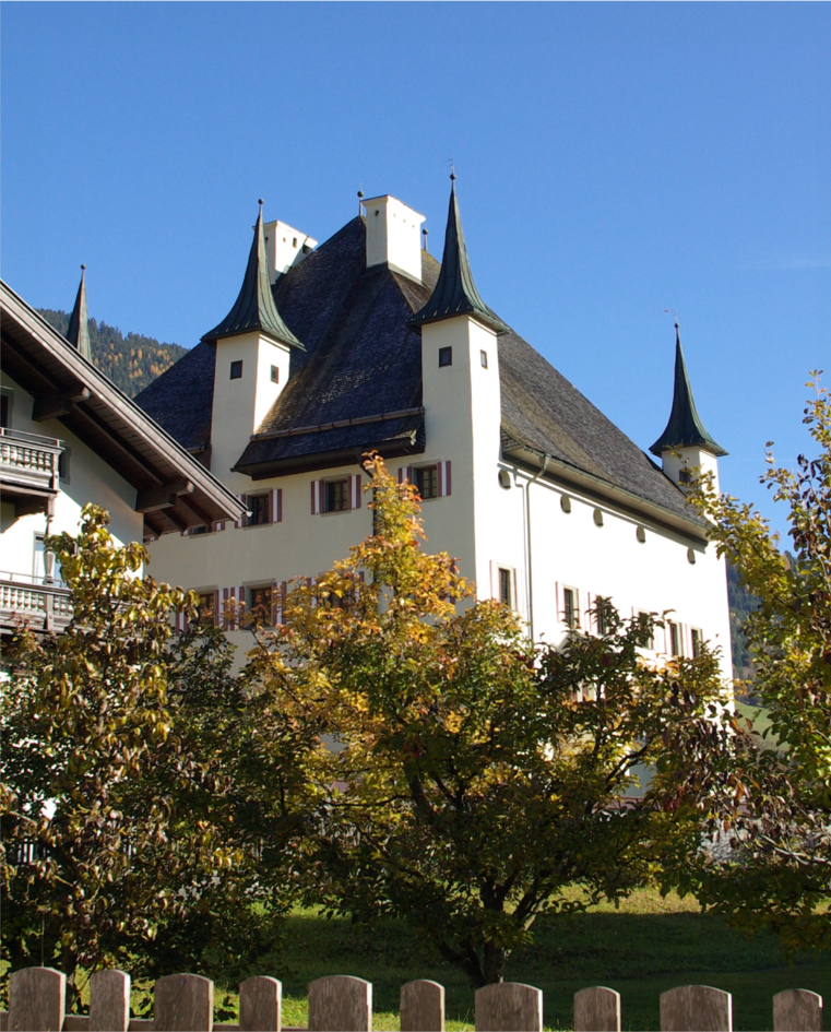 Schloss Lichtenau